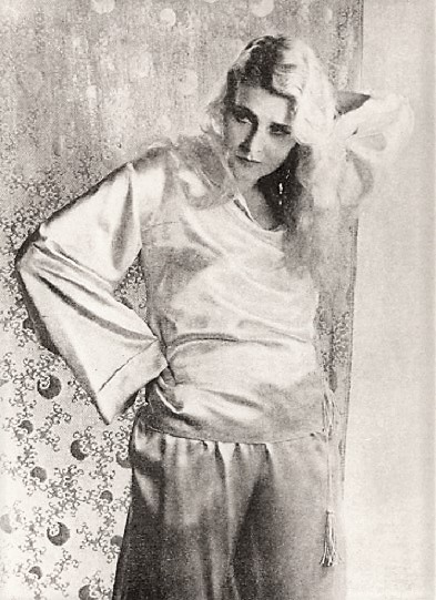 Jeanette Loff